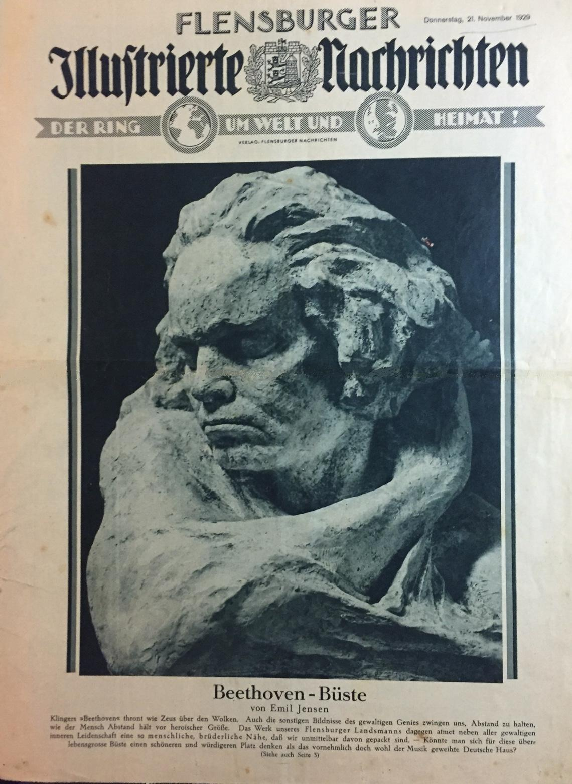 Die Beethoven Büste des Bildhauers und Villa-Massimo Preisträgers Emil Rasmus Jensen (1888-1967) zählt zu den bedeutendsten Werken des Künstlers und wurde formatfüllend auf der Titelseite der 'Flensburger Illustrierten Nachrichten' am 29. November 1929 abgebildet.